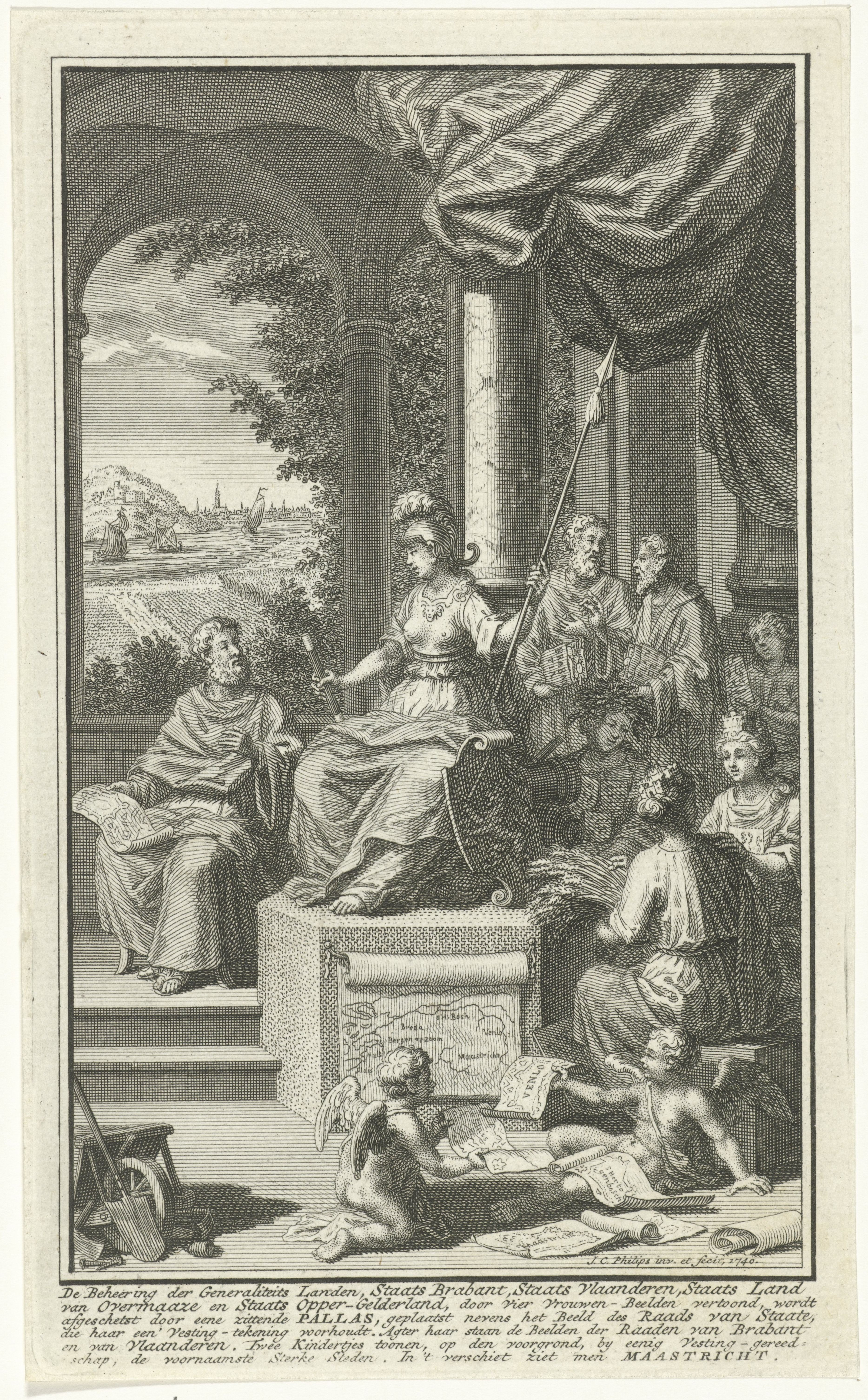 IdentificatieTitel(s): Allegorie op de beheersing van de GeneraliteitslandenTitelpagina voor: J. Wagenaar, Tegenwoordige staat der Vereenigde Nederlanden, 1740Objecttype: prent titelpagina Objectnummer: RP-P-1964-3548Opschriften / Merken: verzamelaarsmerk, verso onder, gestempeld: Lugt 2228Omschrijving: Vertrek met vier vrouwen die de Generaliteitslanden symboliseren en Minerva, in gesprek met een lid van de Raad van State. Op de voorgrond putti met landkaarten van de gebieden. Op de achtergrond een gezicht op Maastricht. In de marge een zesregelig onderschrift in het Nederlands.VervaardigingVervaardiger: prentmaker: Jan Caspar Philips (vermeld op object)naar eigen ontwerp van: Jan Caspar Philips (vermeld op object)Plaats vervaardiging: AmsterdamDatering: 1740Fysieke kenmerken: ets en gravureMateriaal: papier Techniek: etsen / graveren (drukprocedé)Afmetingen: plaatrand: h 177 mm × b 108 mmToelichtingTitelpagina voor: Wagenaar, Jan. Tegenwoordige staat der Vereenigde Nederlanden. Tweede deel. Vervattende eene beschryving der Generaliteits Landen. Amsterdam: Isaak Tirion, 1740.OnderwerpWat: personifications of countries, nations, states, districts, etc.(story of) Minerva (Pallas, Athena)kaarten, atlassenWaar: MaastrichtVerwerving en rechtenCredit line: Aankoop uit het F.G. Waller-FondsVerwerving: aankoop 1964Copyright: Publiek domein